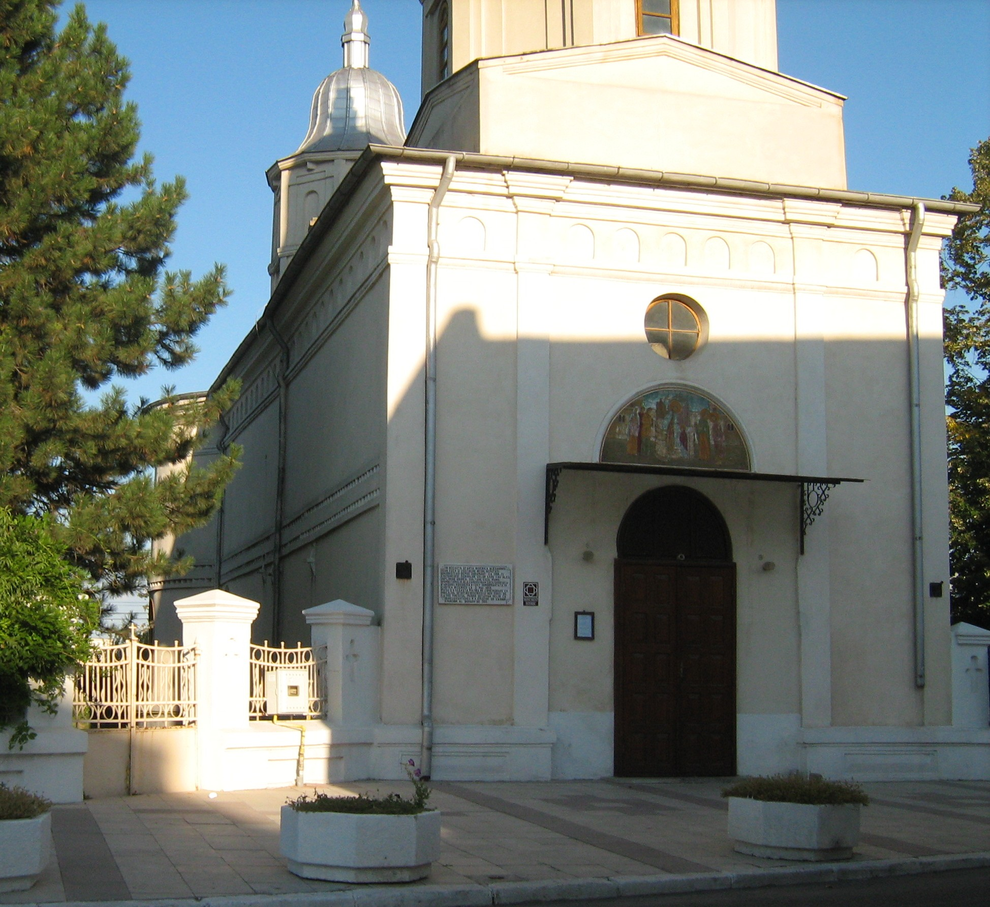 Biserica Intrarea in Biserica Vovidenia